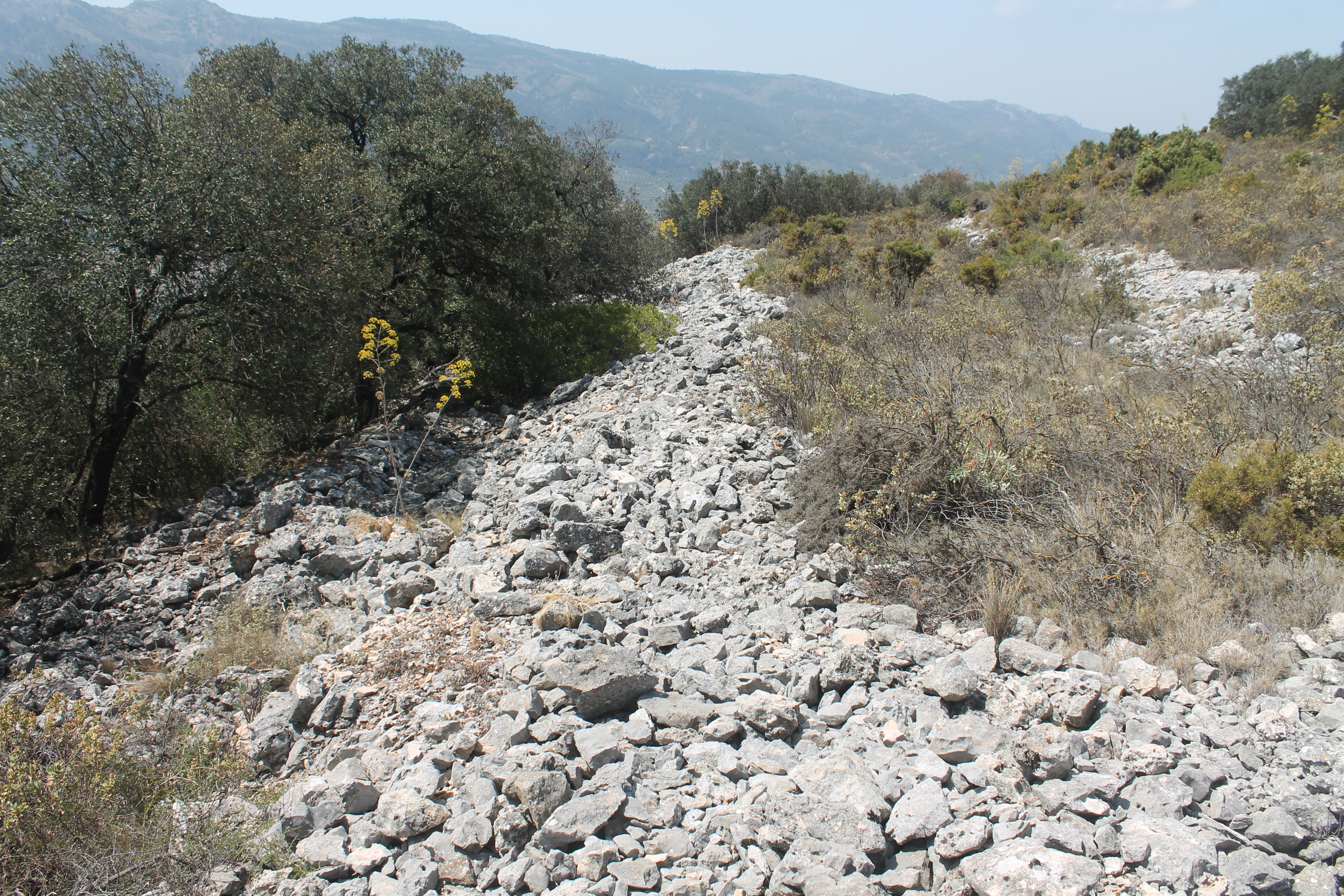 Muralla del yacimiento arqueológico de la Covalta